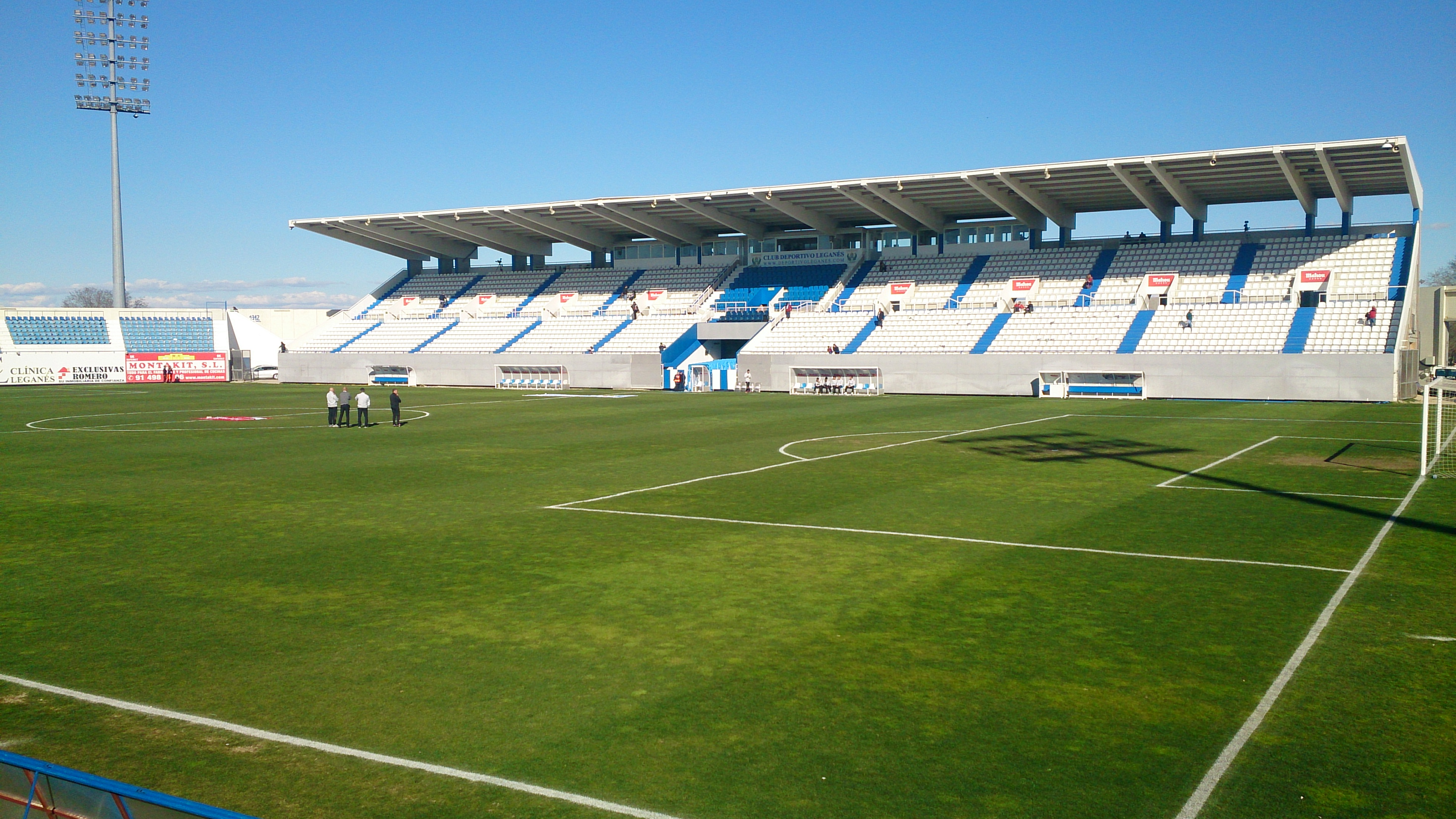 Estadio Butarque antes del Leganés-Sporting de Gijón de 2015